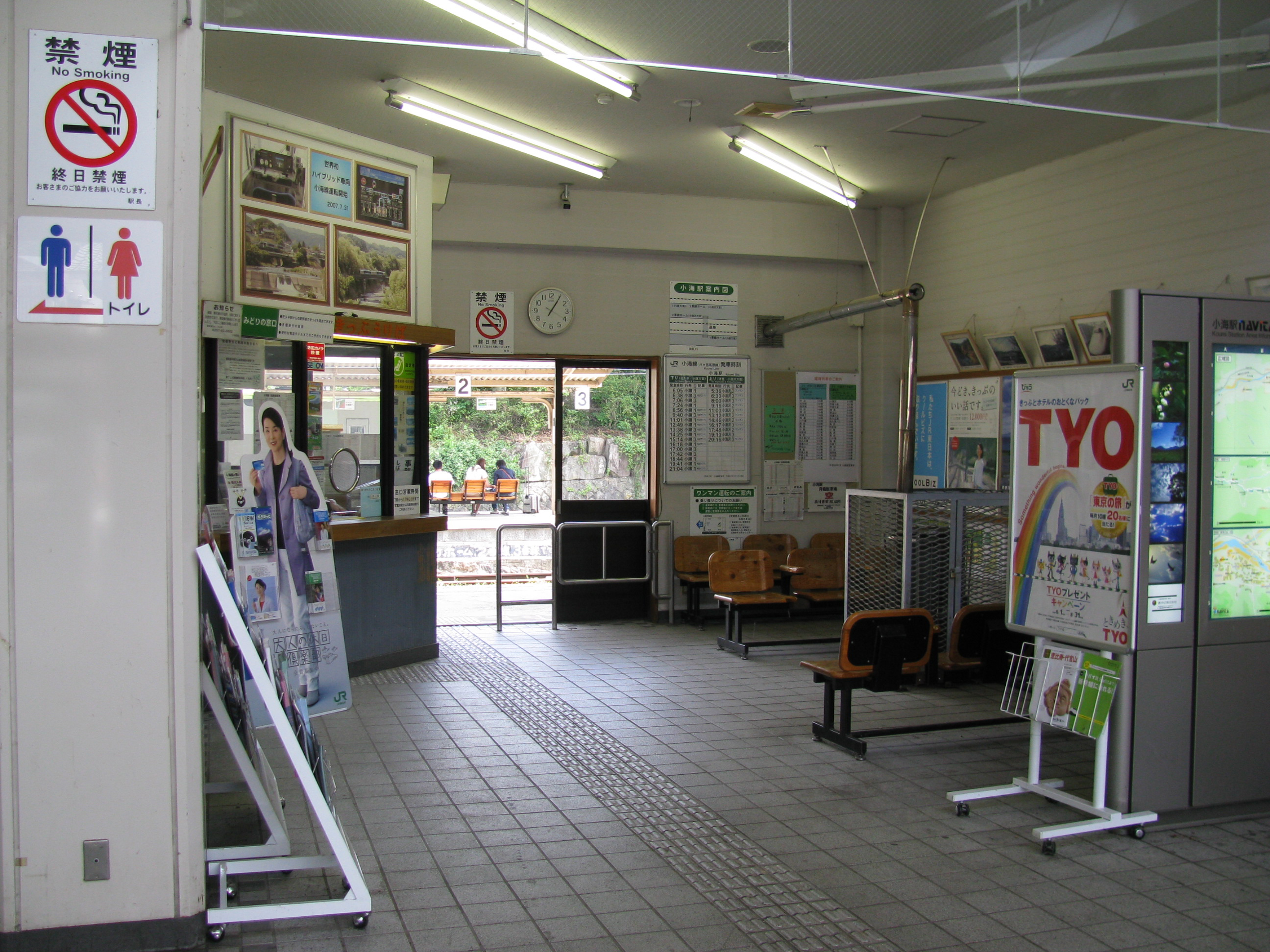 東日本旅客鉄道小海線小海駅